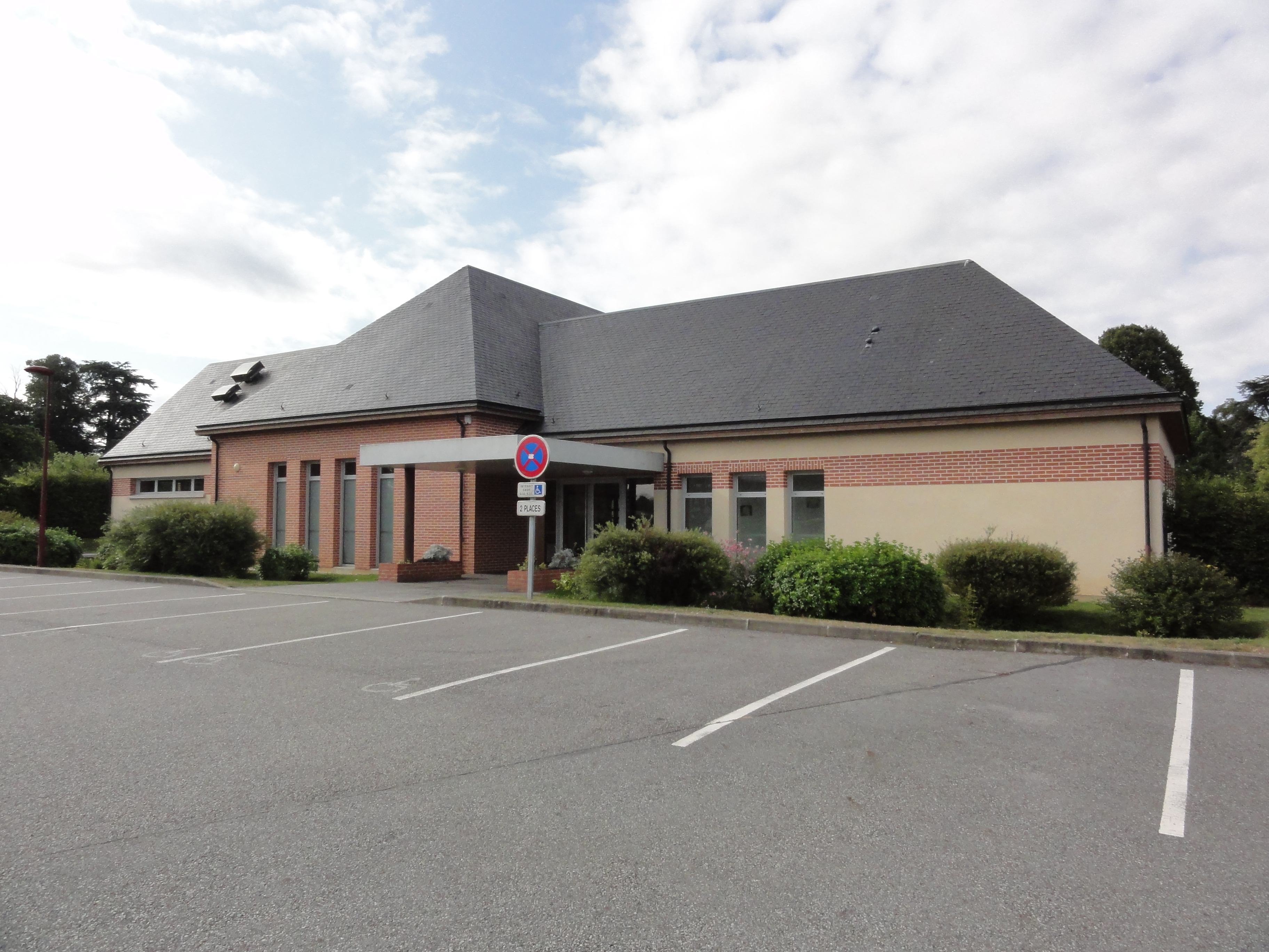 Motteville (Seine-Mar.) salle des fêtes